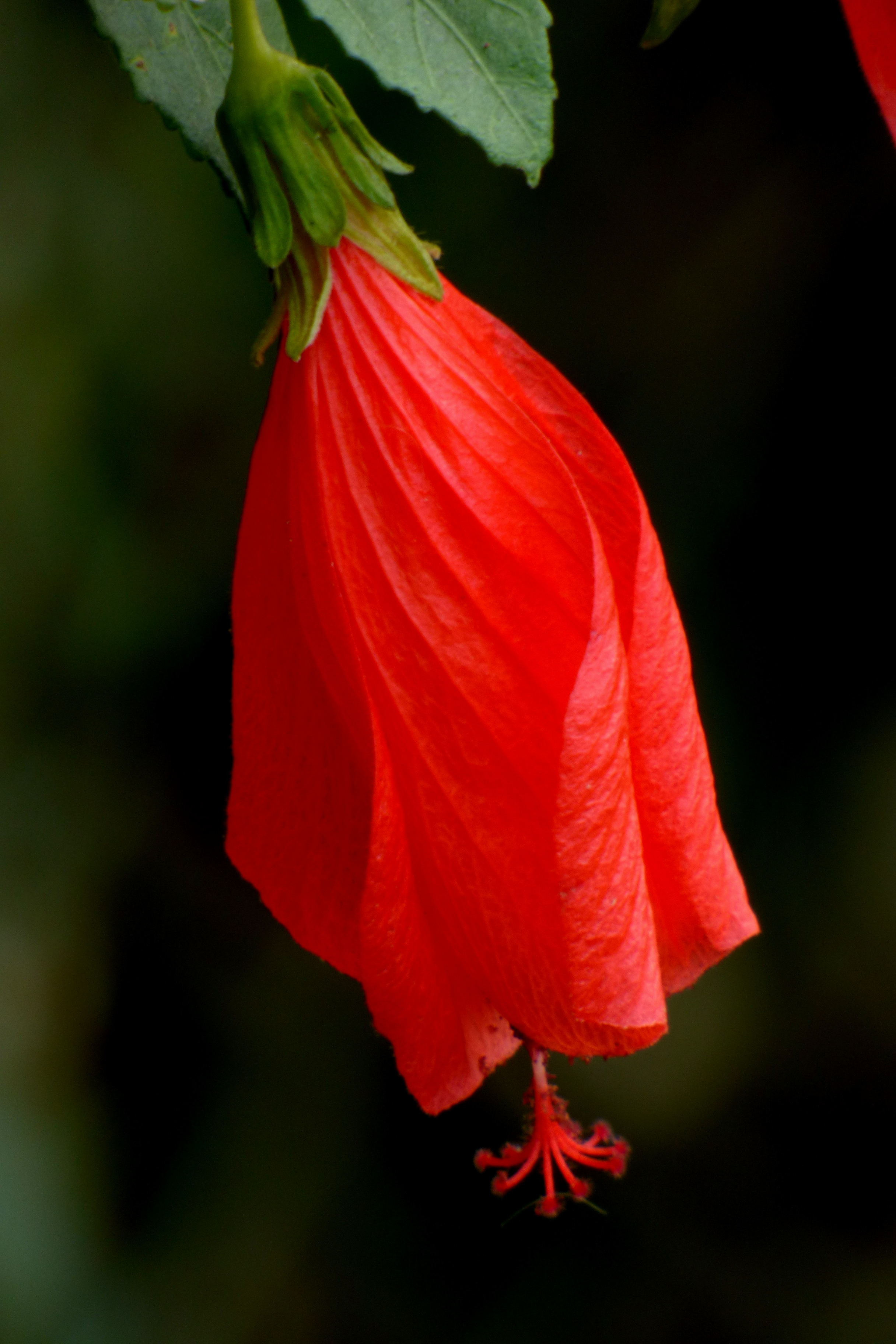 Malvavisco, Manzanita, Monaguillo, Falso hibisco (Malvaviscus sp.)